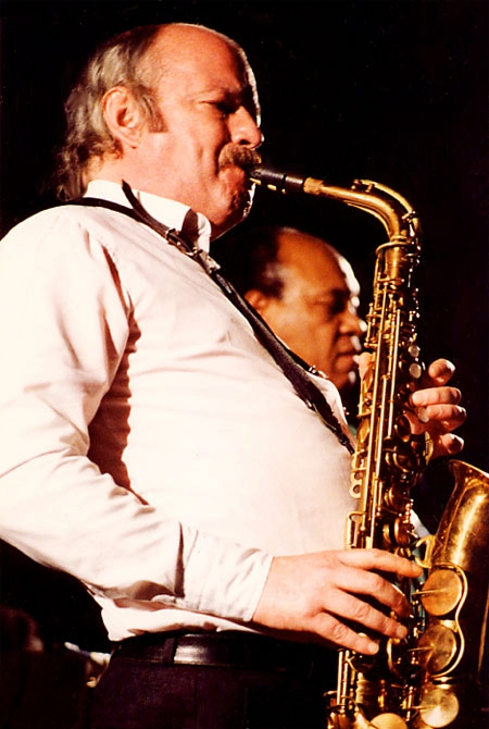 Elton Dean performing in 1977